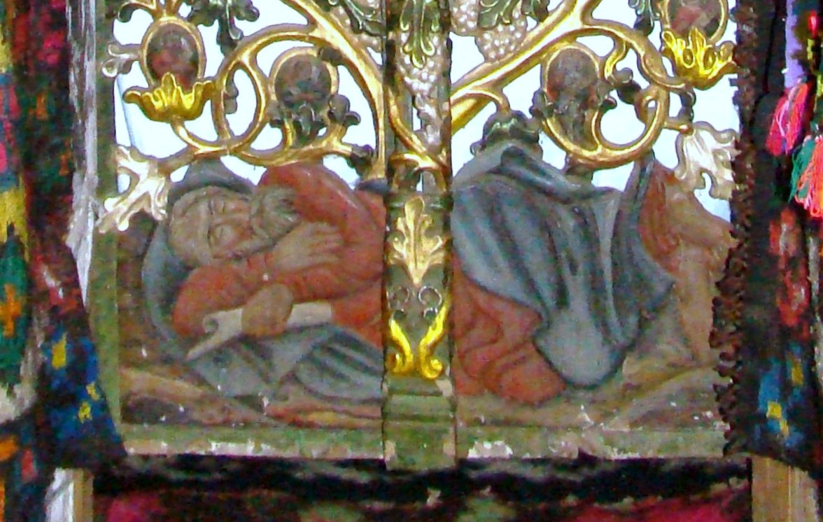 Biserica de lemn "Cuvioasa Paraschiva" , sat POIENILE IZEI